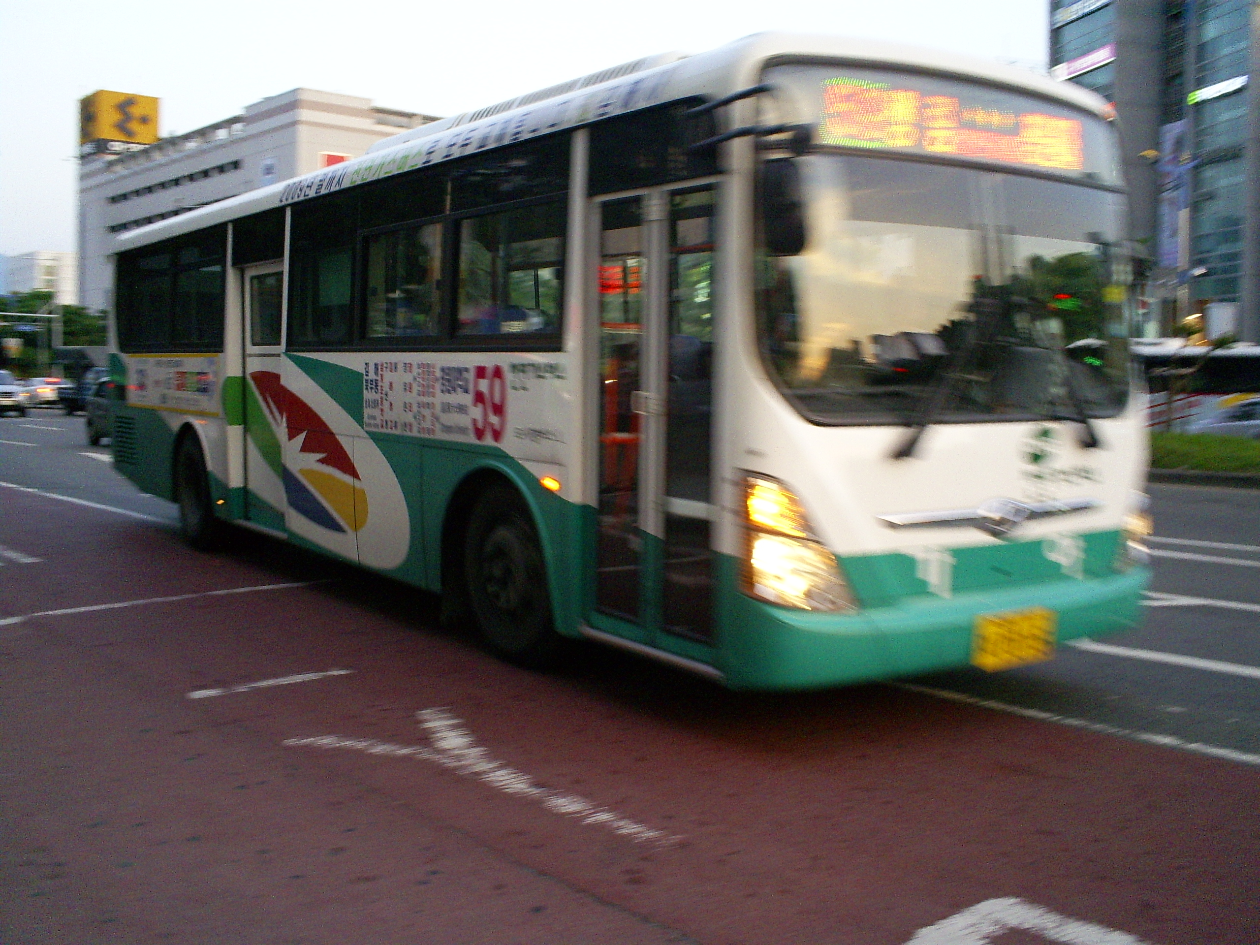 창원 정우상가 정류장으로 접근하는 김해시내버스 59번 노선 버스 차량(창원대 방면 정류장에서 촬영), 자작